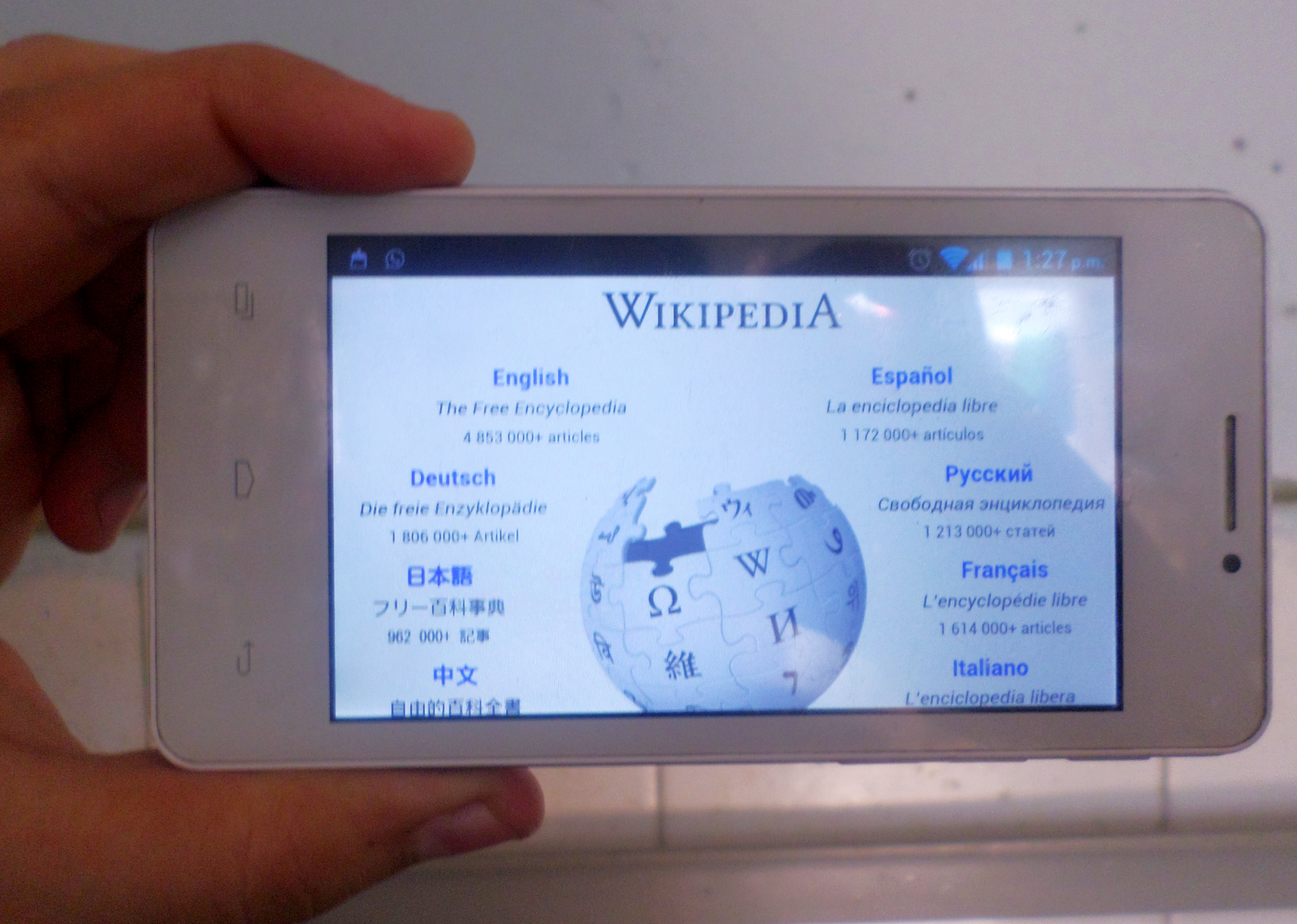 Movil marca Avvio modelo L500 mostrando la pagina inicial de wikipedia